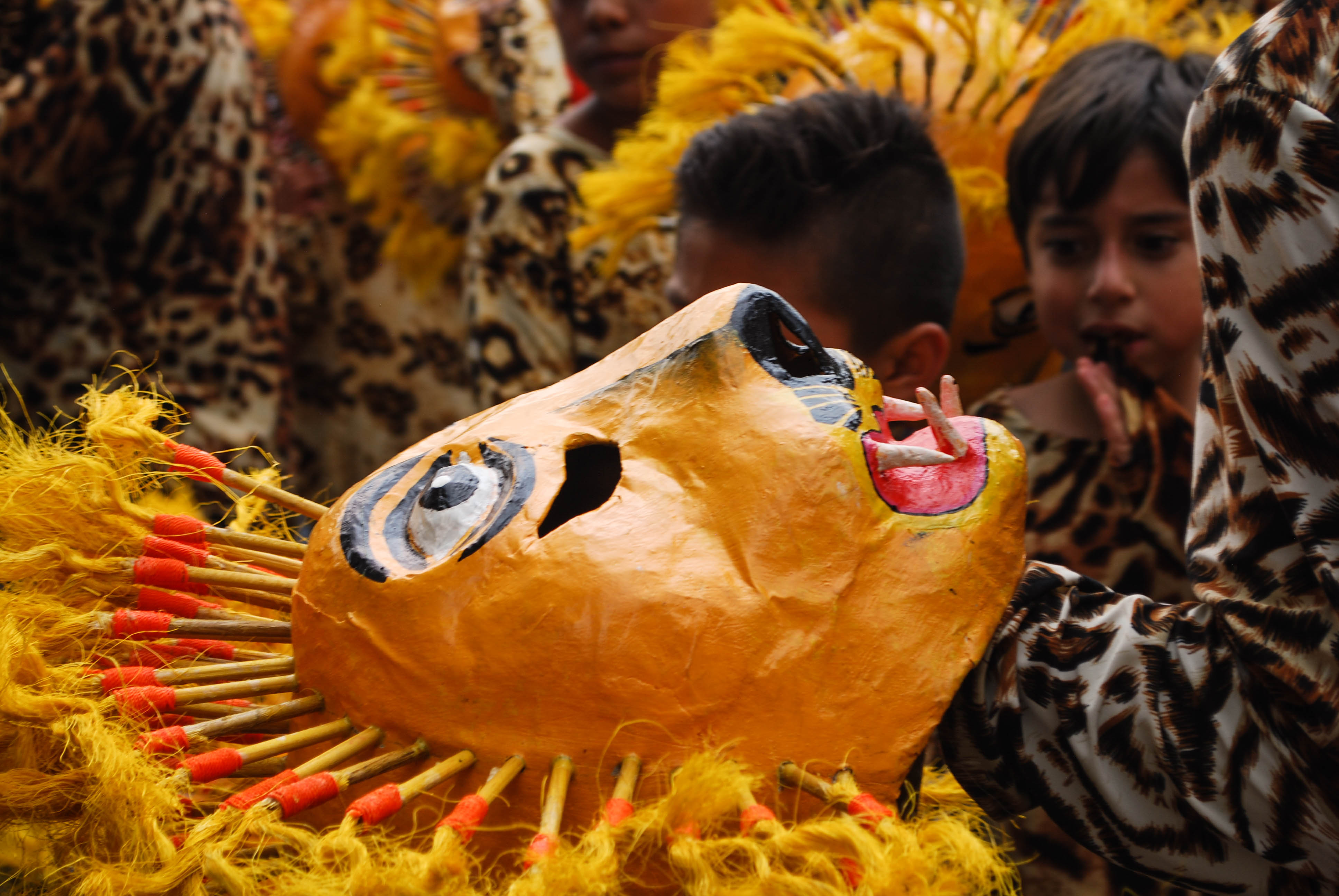 Comparsa Yedaix, representada por puros niños en la Mojiganga de Zacualpan, Morelos.